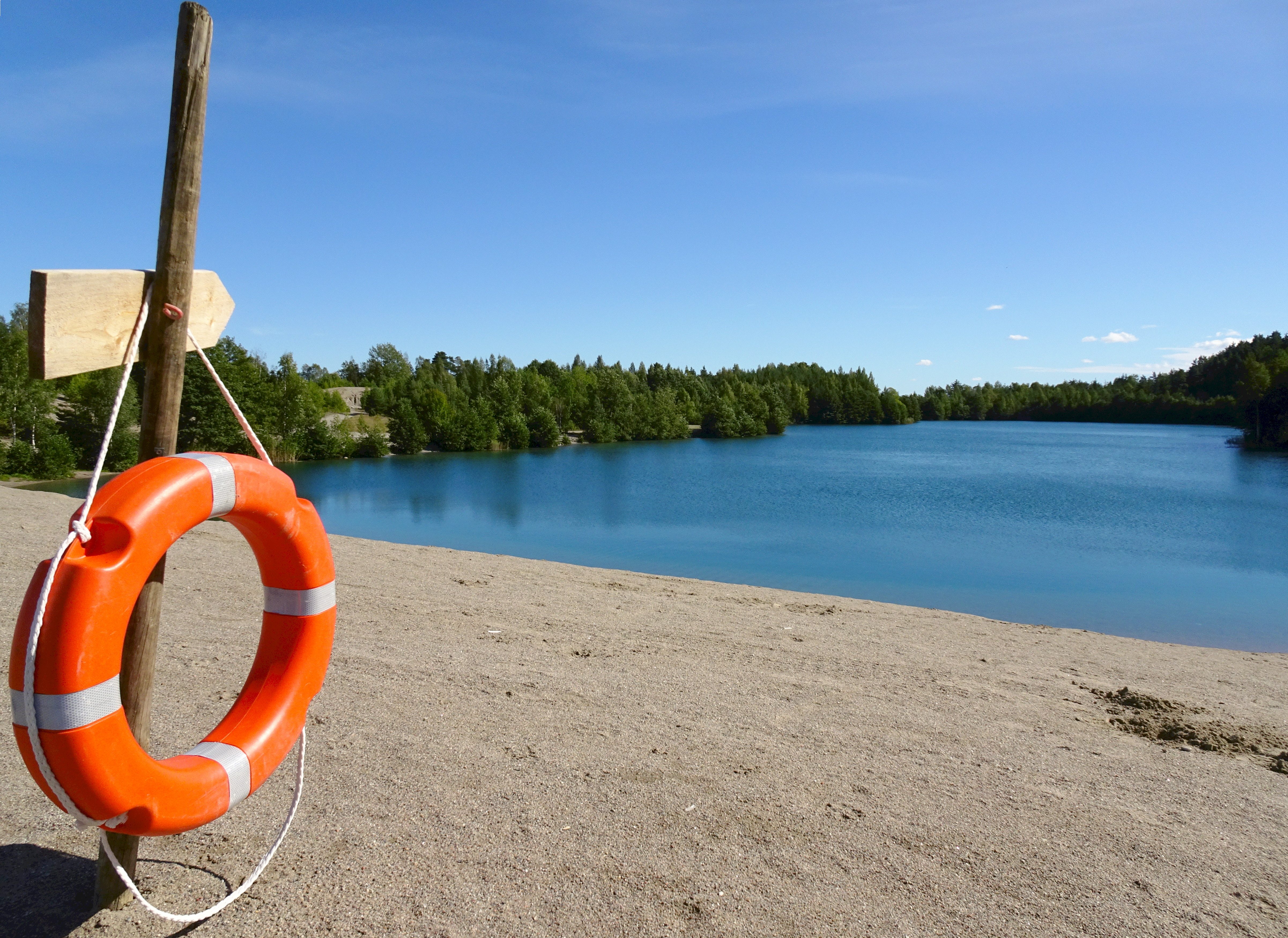 Blå lagunen på Munsön, Ekerö kommun, tidigare grustäkt